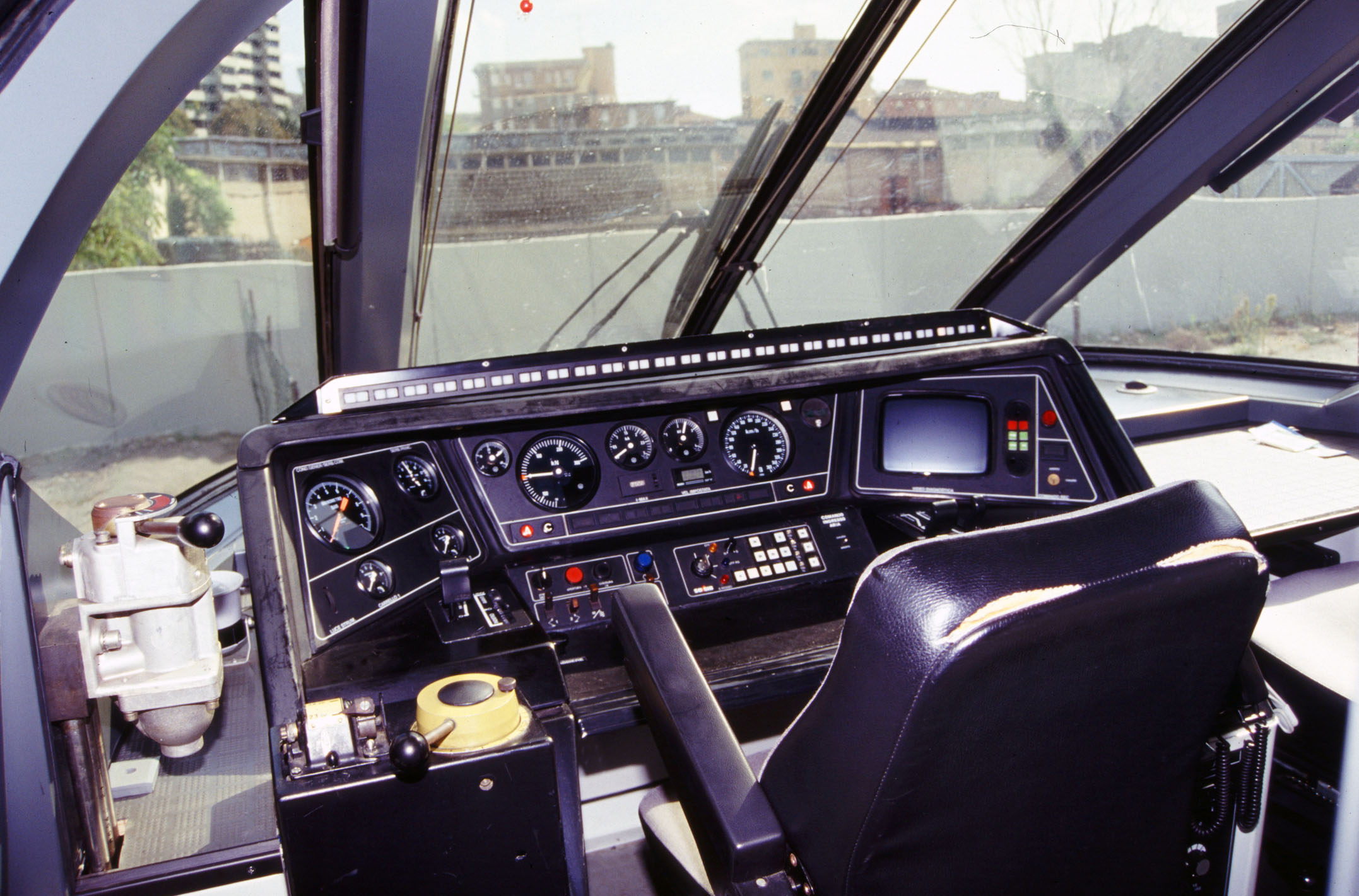 Posto di guida dell'ETR 500 X prototipo in mostra a Bologna nel 1994, autore Sandro Baldi, Bologna, Italia.